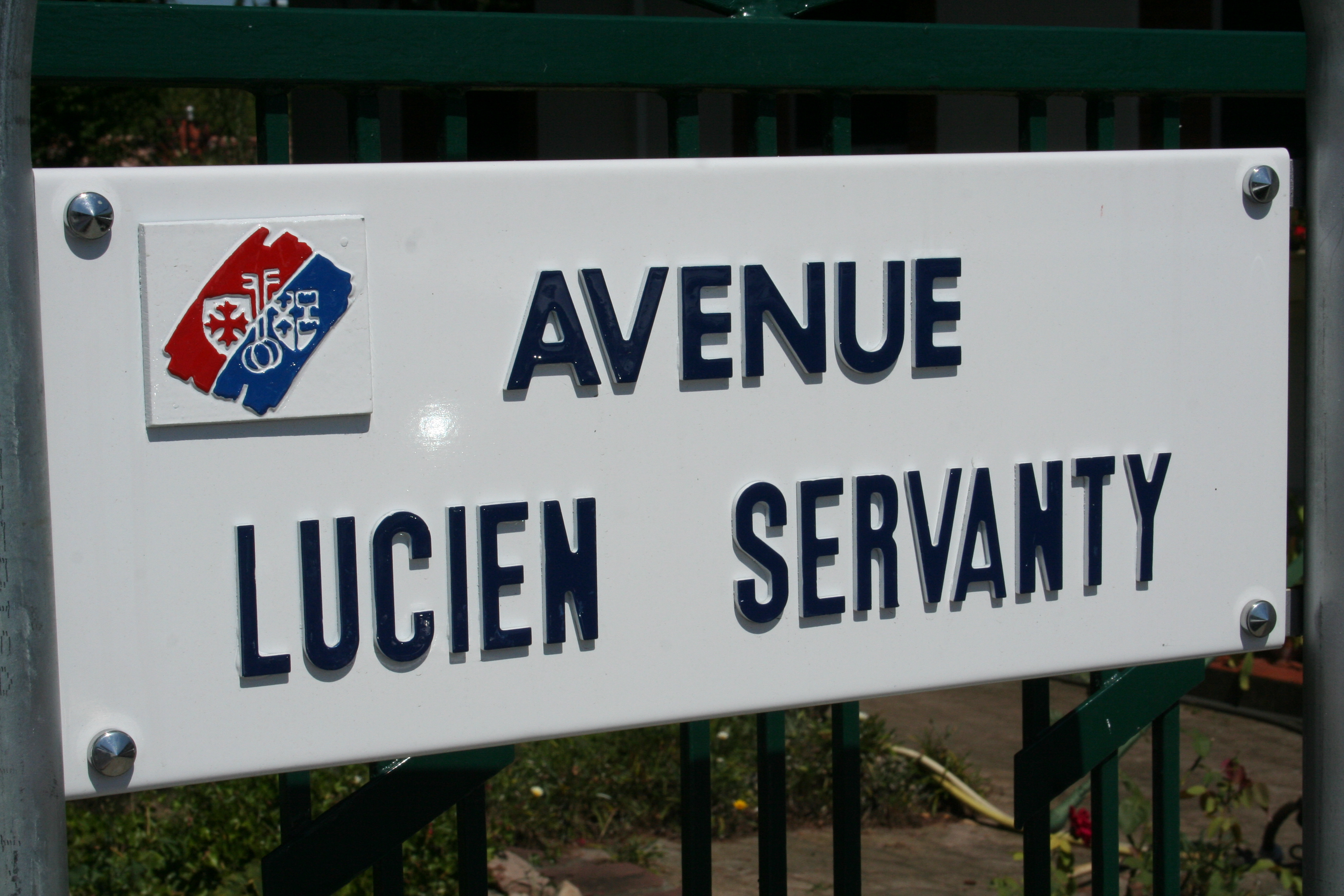 L'avenue portant le nom de l'ingénieur français Lucien Servanty à Blagnac (Haute-Garonne, Midi-Pyrénées, France).